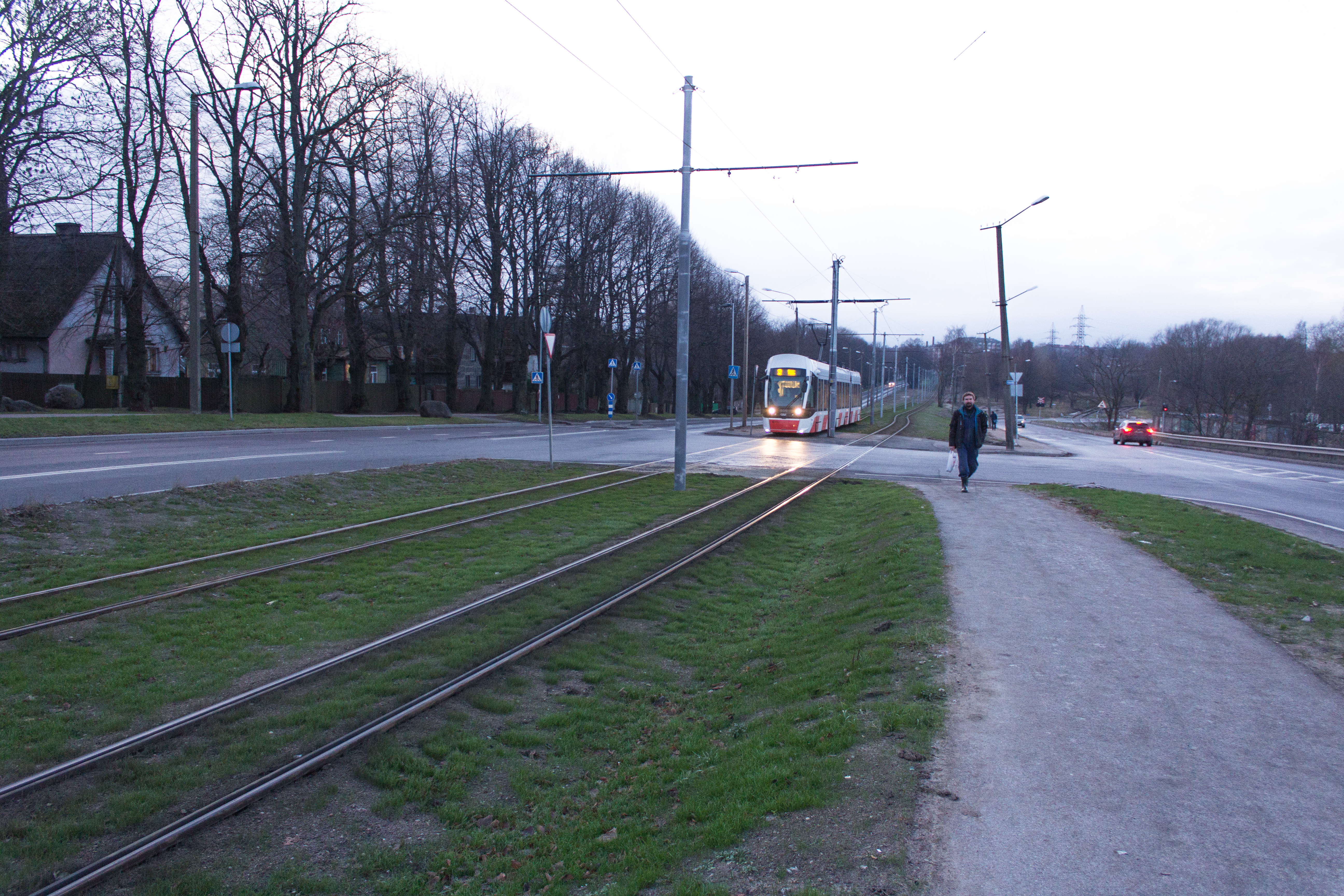 Vaade Sitsi mäelt Kopli suunas (Kopli tänav)